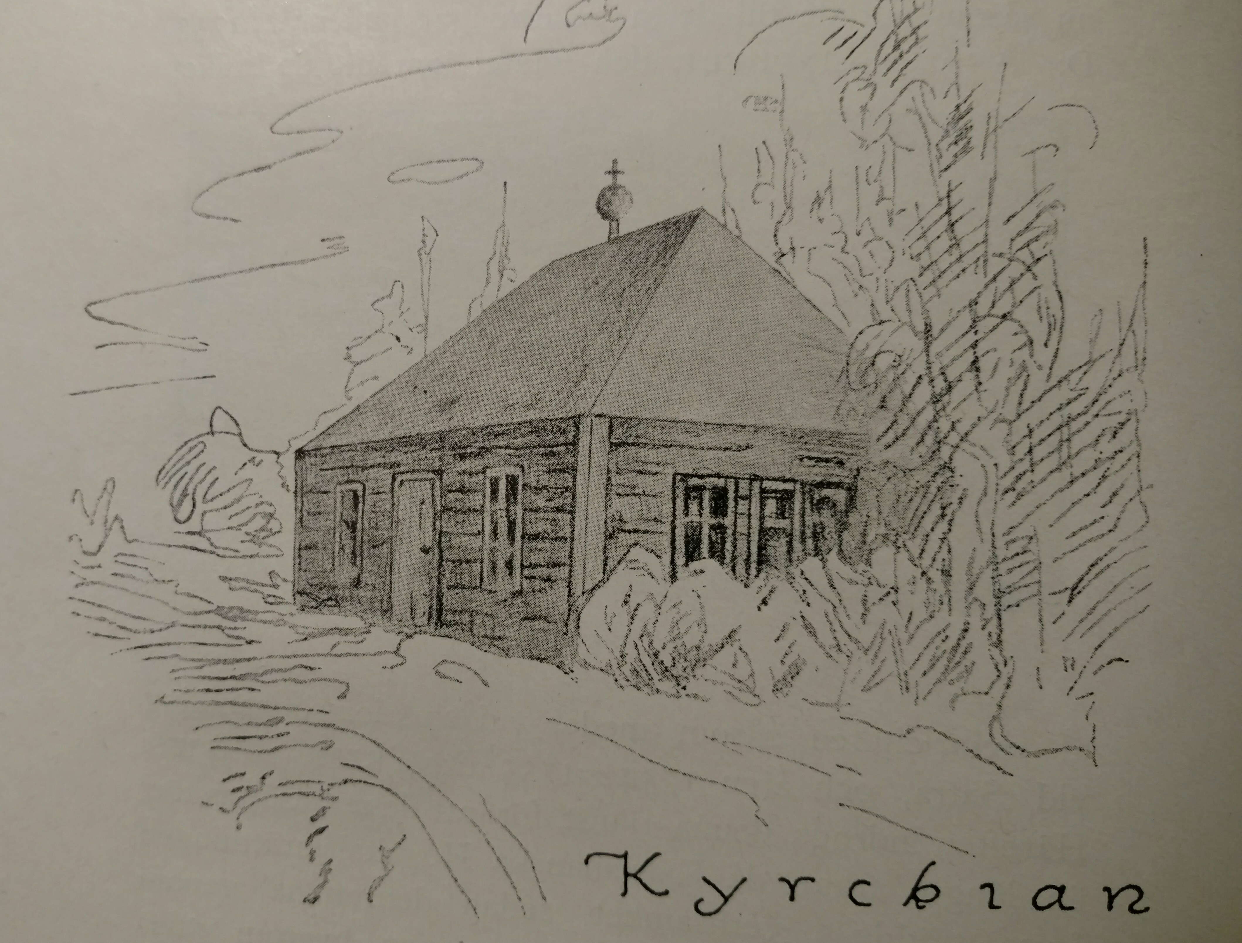 Illustration av en tidigare kyrka på Sätra brunn, publicerad 1916.